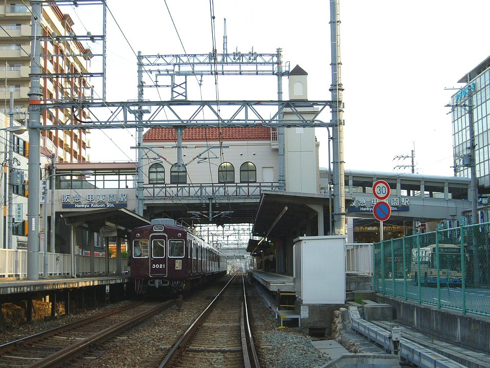 阪急今津線甲東園駅 甲東園踏切から南望